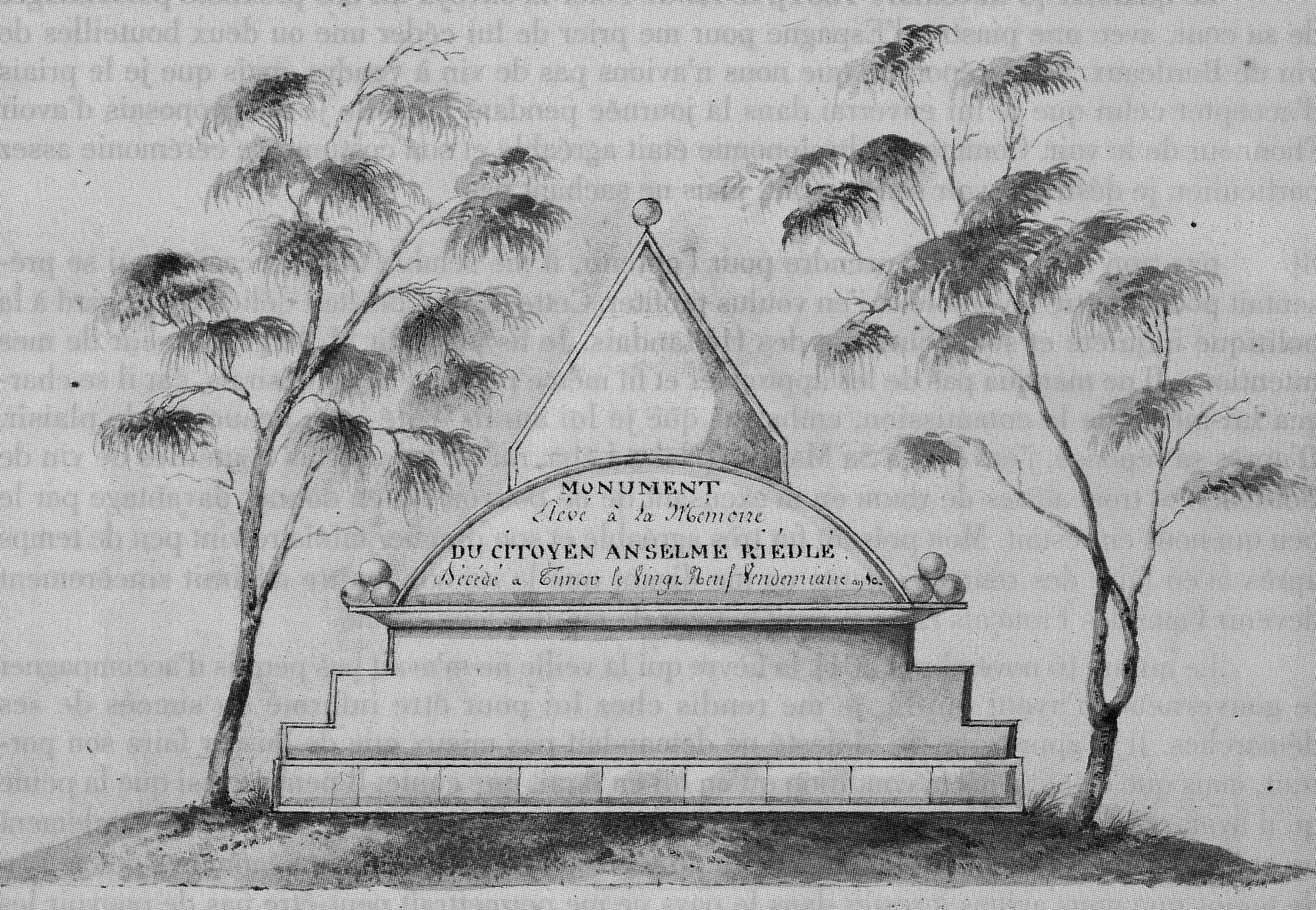 Grabmal in Kupang in Westtimor, Niederländisch-Indien, das Nicolas Baudin (1754–1803) dem an einer Infektion des Verdauungstrakts verstorbenen Chefgärtner seiner Australien-Expedition Anselm Riedle, französisch Anselme Riedlé (1775–21. Oktober 1801) aus Irsee im Allgäu errichten ließ. Dessen Grab enthielt auch die sterblichen Überreste des 1789 in Kupang verstorbenen englischen Botanikers David Nelson. Die Inschrift lautete gemäß Baudins Reisetagebuch: "Ici repose Anselme Riedlé d’Ausbourg, âgé de trente-cinq ans, jardinier en chef de l’expédition de découvertes ordonnée par le Premier Consul Bonaparte, l’an IX. Son zèle, son activité, ses travaux furent la cause de sa mort le 29 vendémiaire an X. Qui que vous soyez, respectez son tombeau et le monument qui doit transmettre son nom à la postérité ainsi que celui de David."